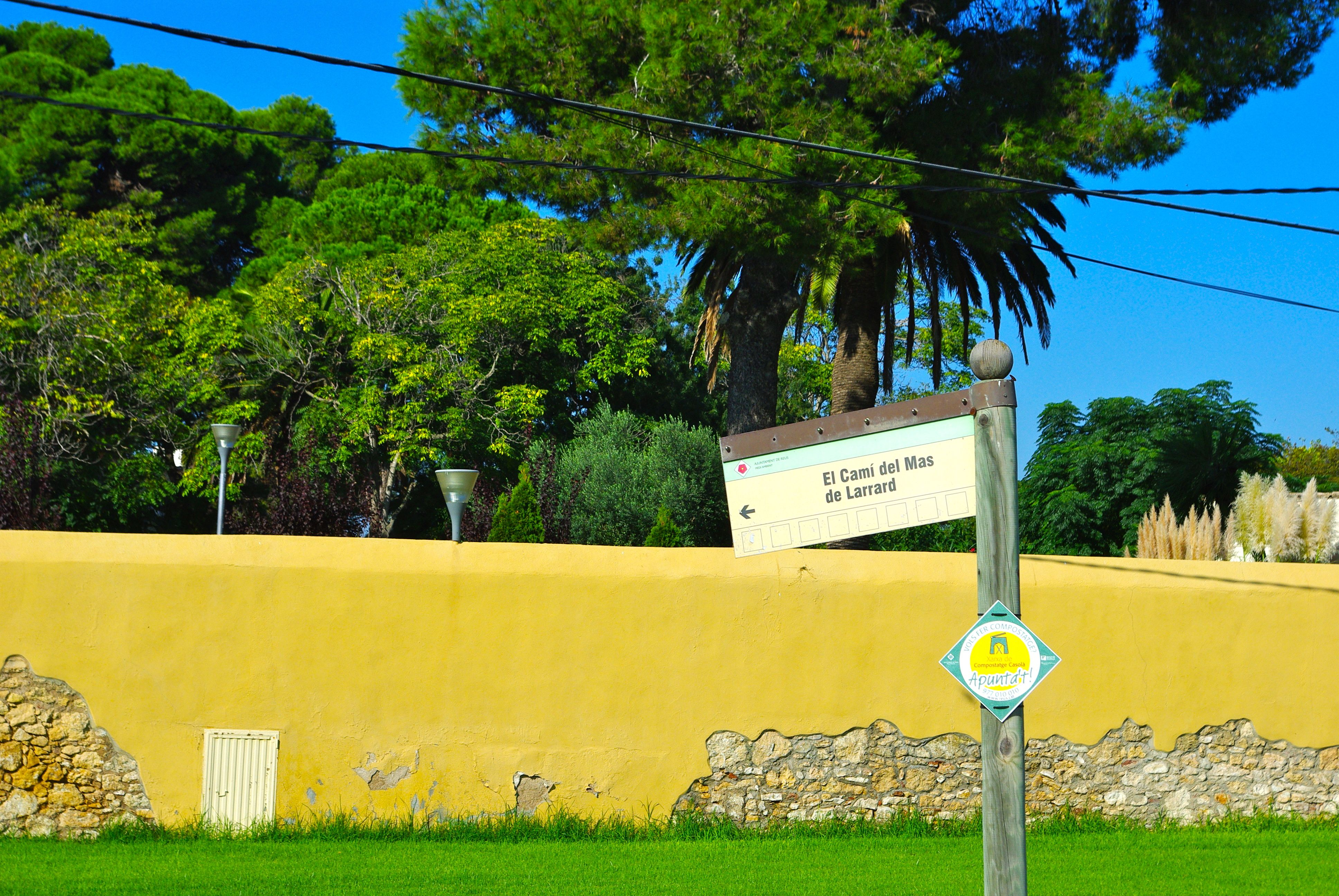 Indicador del Camí del Mas de Larrard Vora El Mas del Plana, al terme de Reus